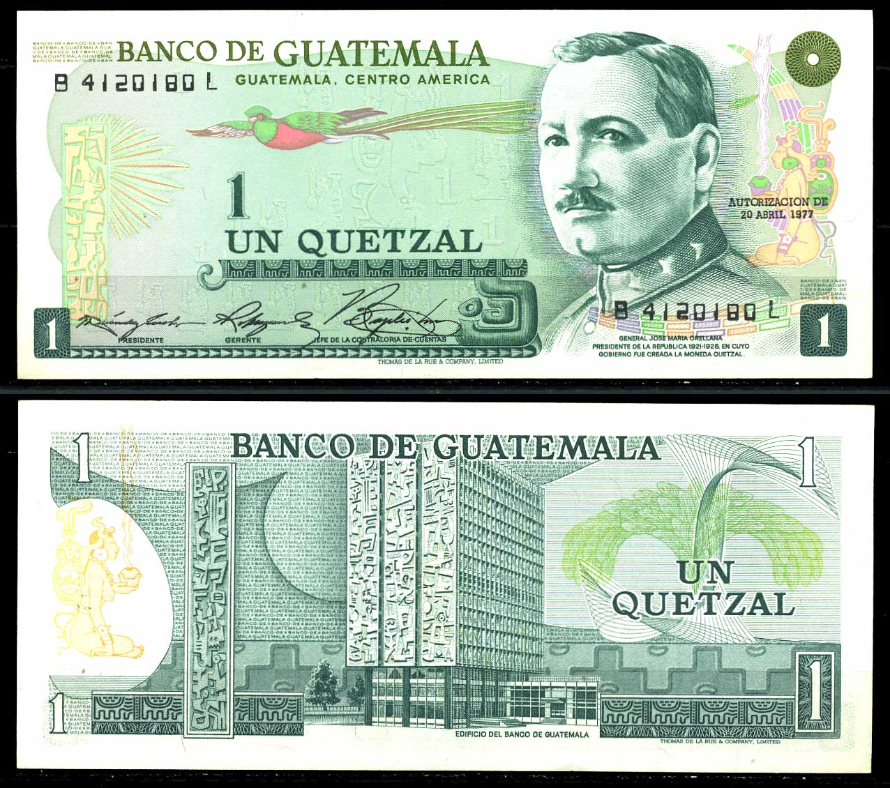 1 кетсаль 2012 год. Гватемала.